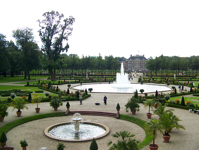 Paleis het Loo